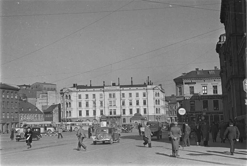 Jernbanetorget i april 1938, torg, mennesker, gateliv, kontorbygninger, bygårder, Østbanestasjonen.